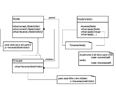 openscenegraph